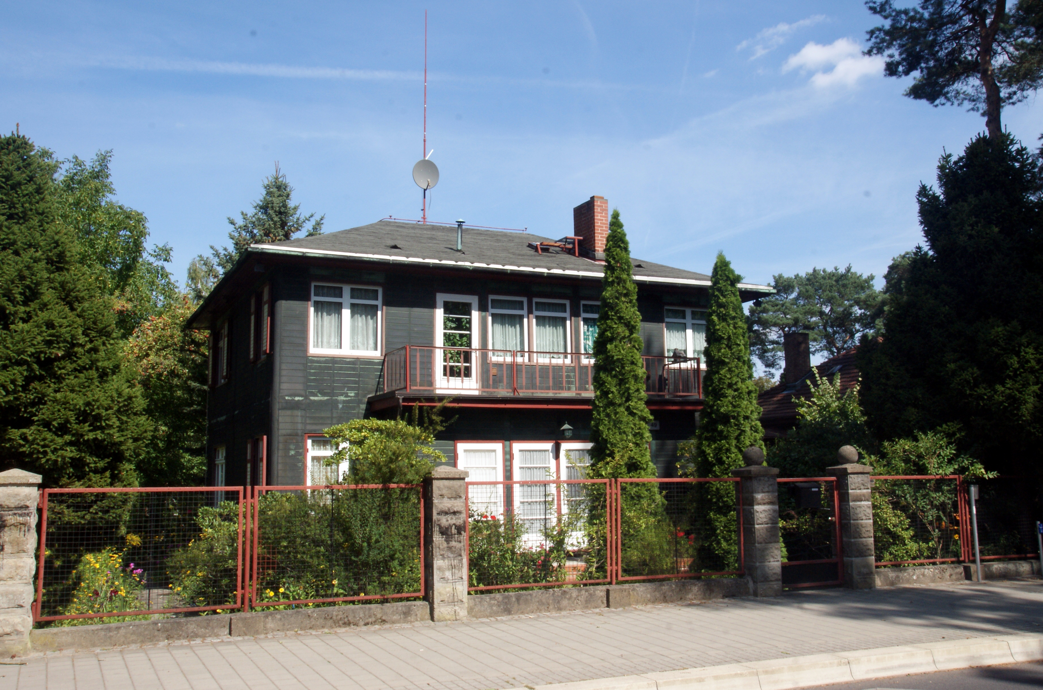 Kupferhaus am Forstweg 49 in Zeuthen, Brandenburg.